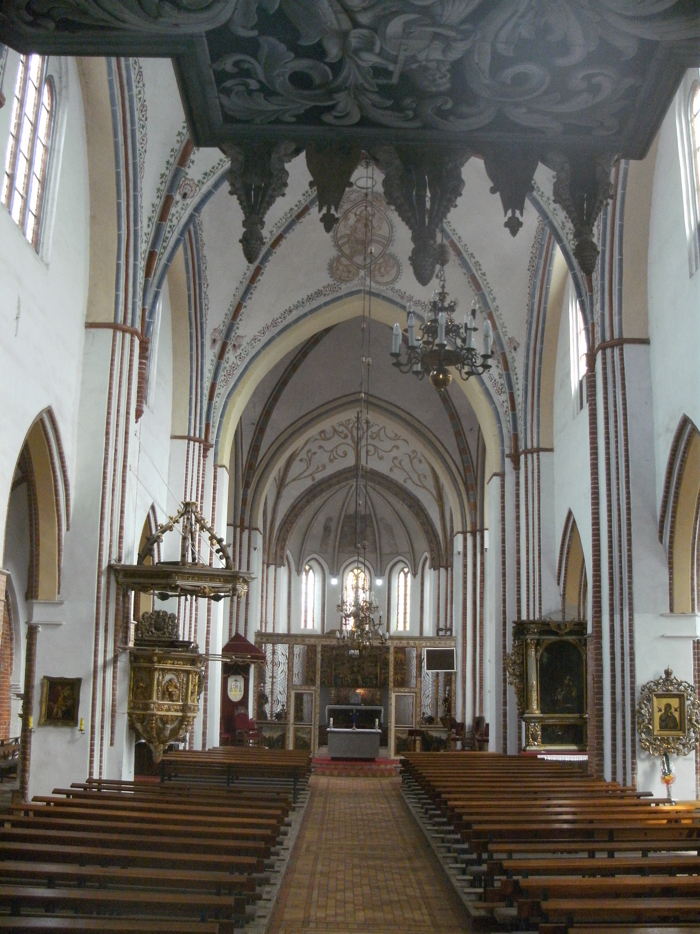 Cammin i. Pom., Dom innen. Zum Zeitpunkt der Aufnahme war der Dom verschlossen. Das Foto wurde bei geschlossenem Hauptportal durch ein Loch in einer Glasscheibe hindurch aufgenommen, die sich über der Eingangstür befindet. Um das Objektiv der Digtitalkamera durch das Loch in der Glasscheibe hindurchstecken zu können, musste ich auf einen Stuhl klettern und die Kamera mit hochgereckten Armen festhalten, was gerade noch so ging. Das Objektiv dürfte sich in einer Höhe von etwa drei Metern über dem Fußboden befunden haben.